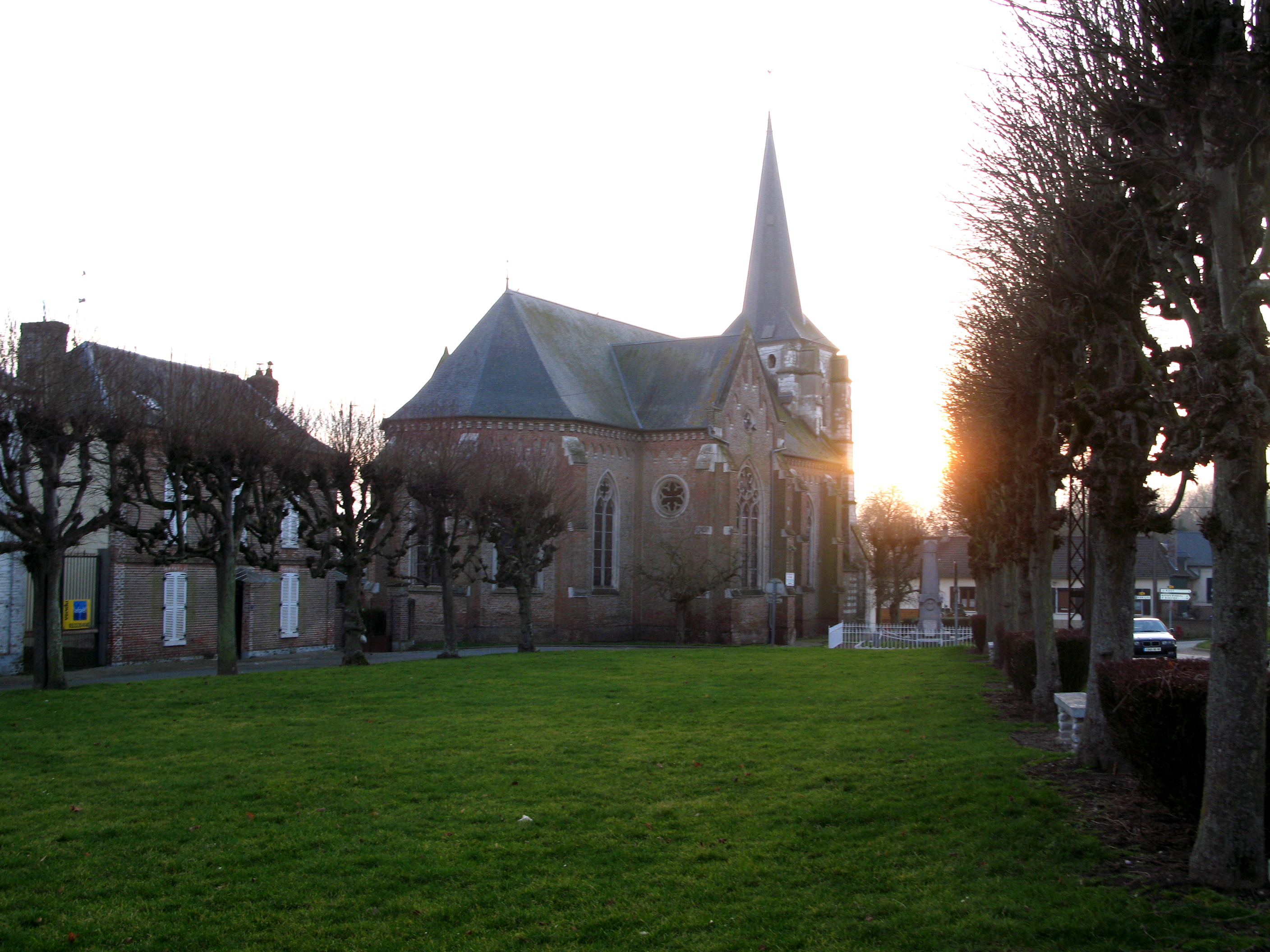 Domqueur (Somme, France). La place centrale, ou "Place de l'église".